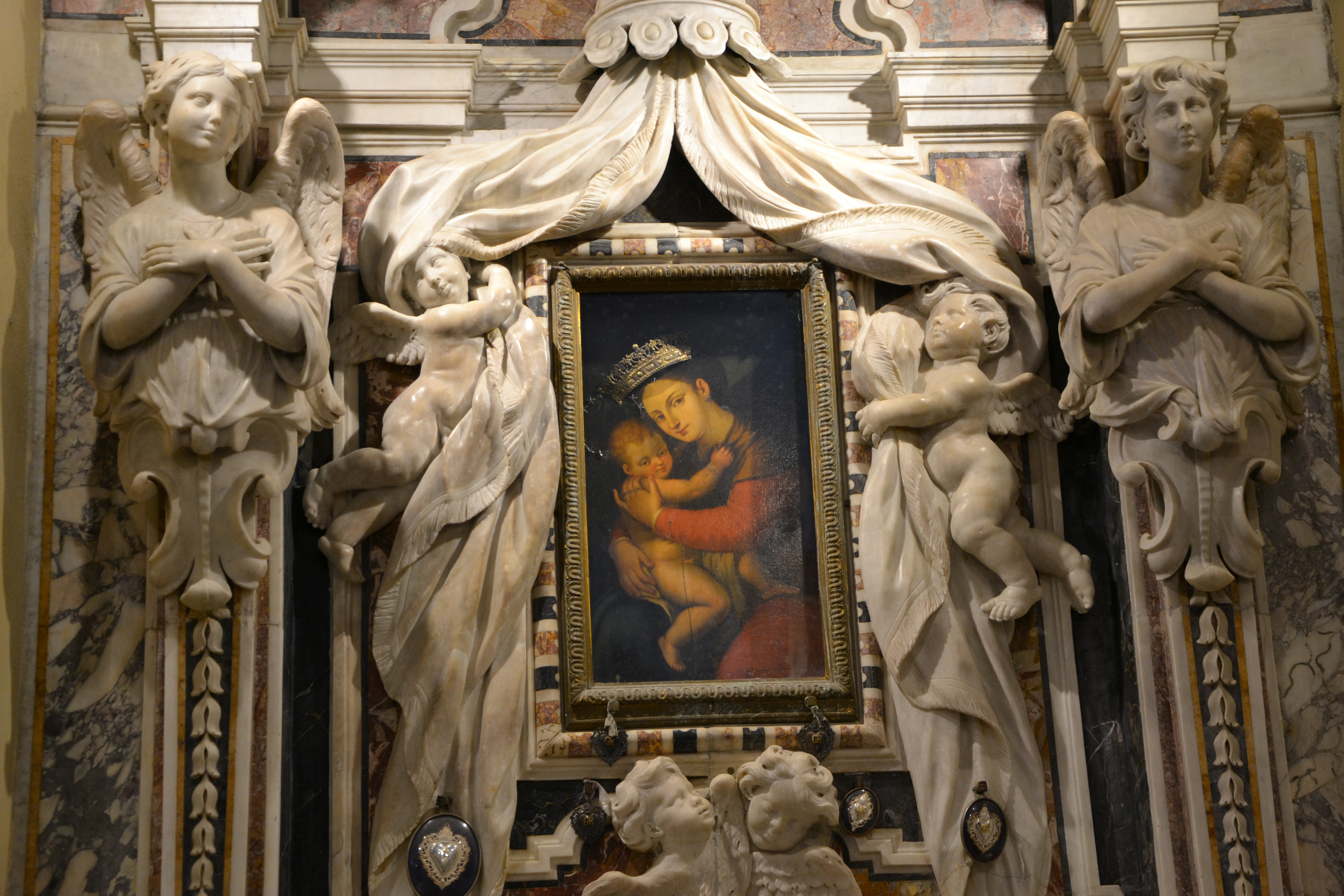 altare in marmo (fine del XVII secolo), dedicato alla Madonna del Soccorso, Chiesa di San Marco al Molo (Genova)